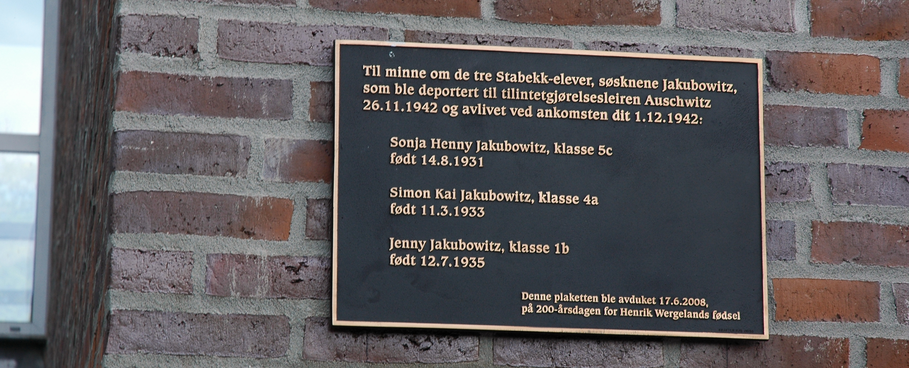 Memorial plaque at Stabekk elementary school over Jewish children who were murdered during the Holocaust Мемориальная доска в городе Стабек в память трёх еврейских детей, которых прямо из школьного класса отправили в Освенцим.